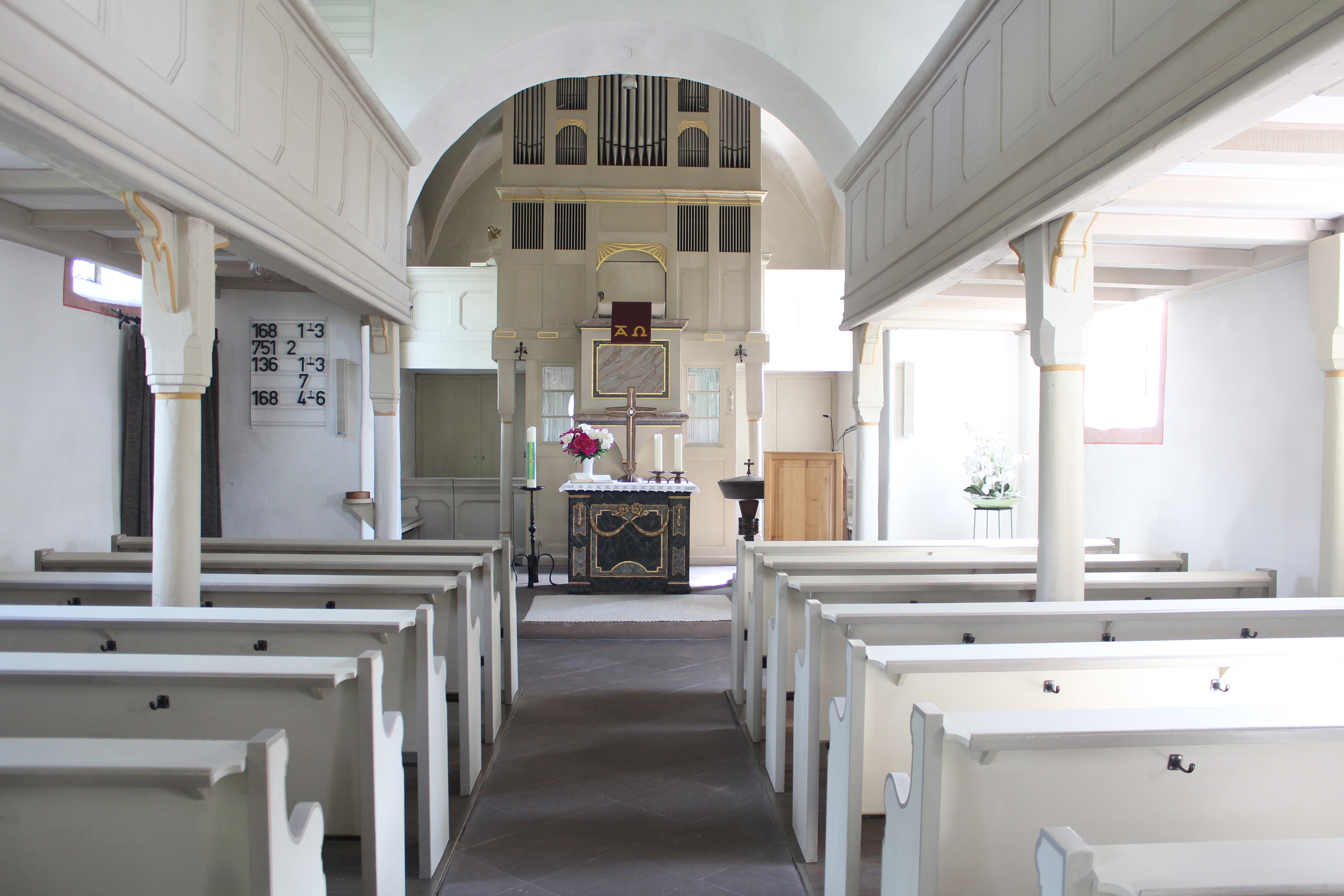 Innenraum der evangelischen Kirche zu Wetzlar-Steindorf mit Blick zum Altar und Johann-Hartmann-Bernhard-Orgel